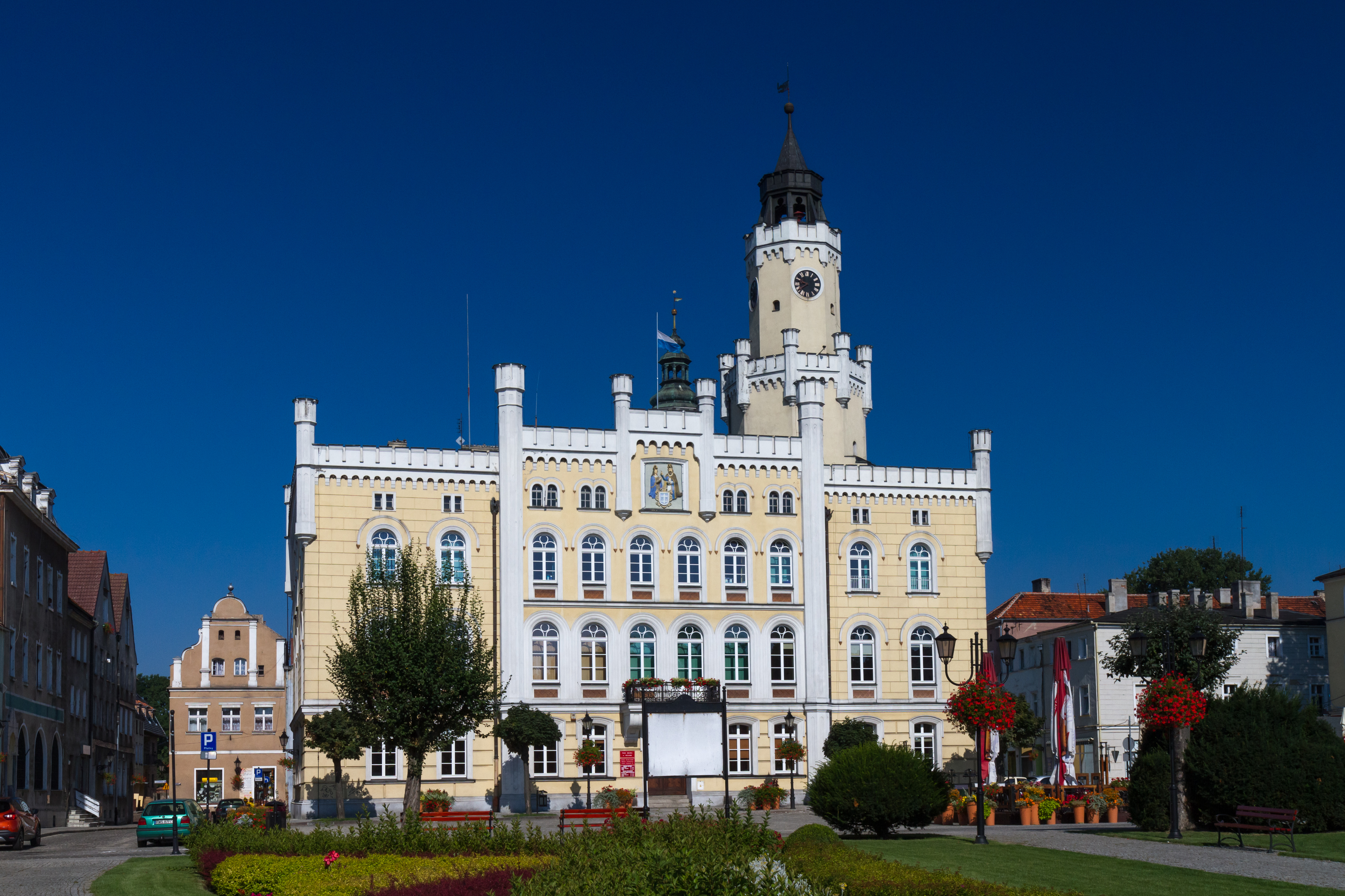 Wschowa, ratusz, 1 poł. XVI, XVII, 1860-1862